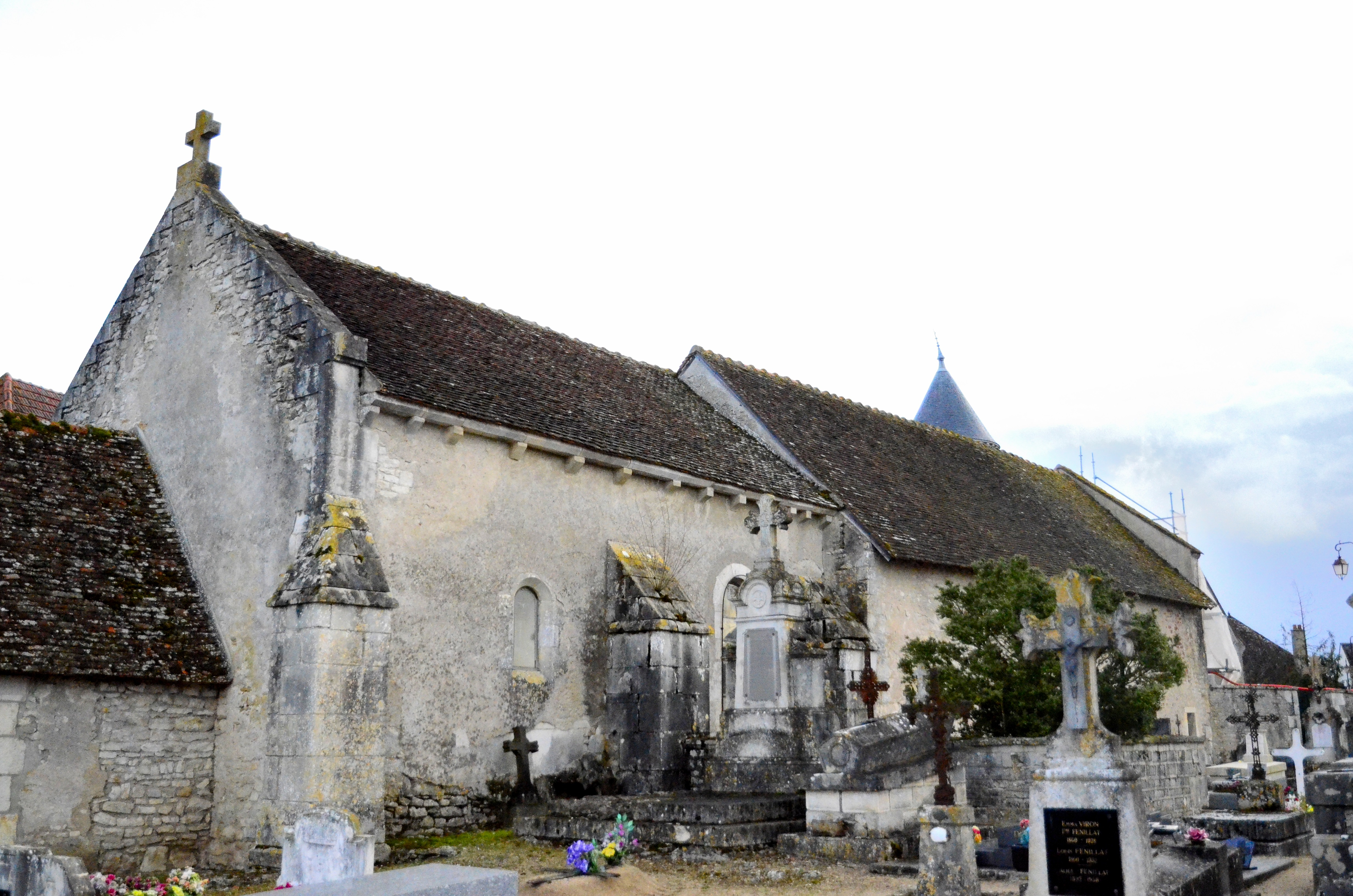 Vue générale de l'édifice du XIIe siècle, depuis le cimetière